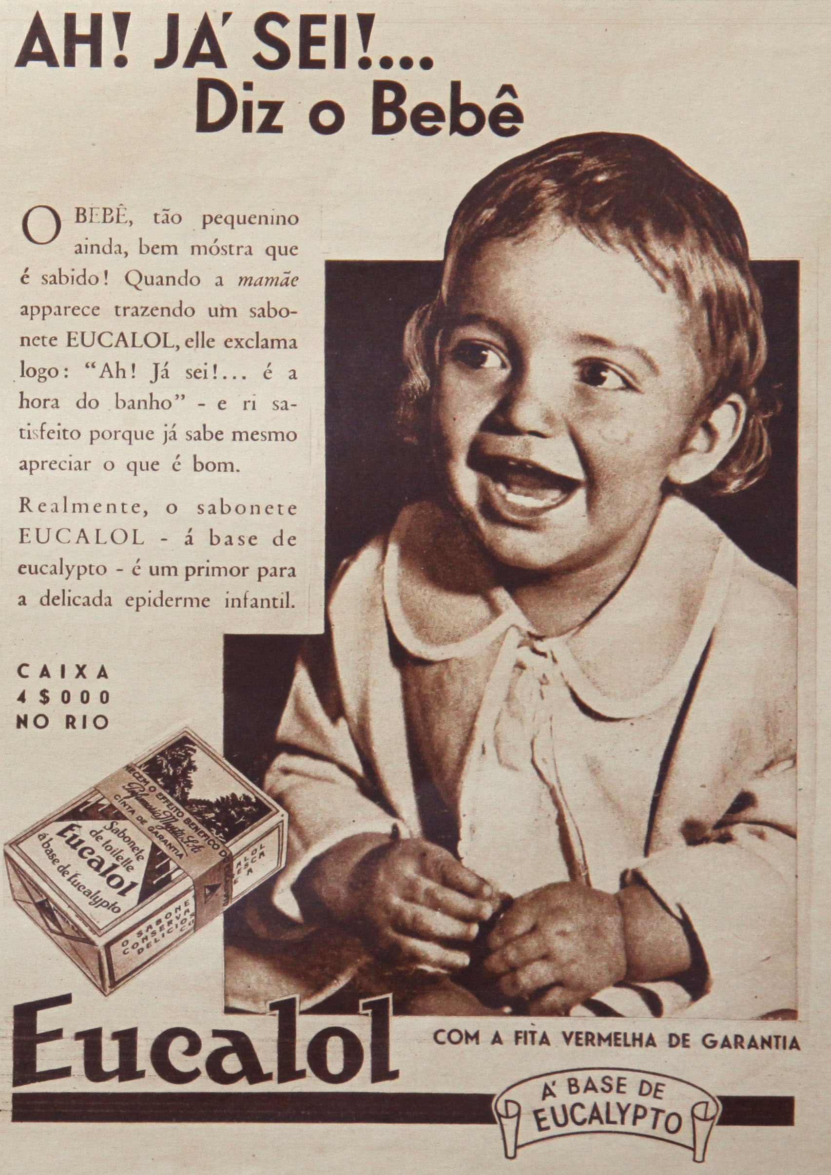 Anúncio do Sabonete Eucalol publicado no Jornal A Noite Ilustrada número 282 em 13 de abril de 1935.